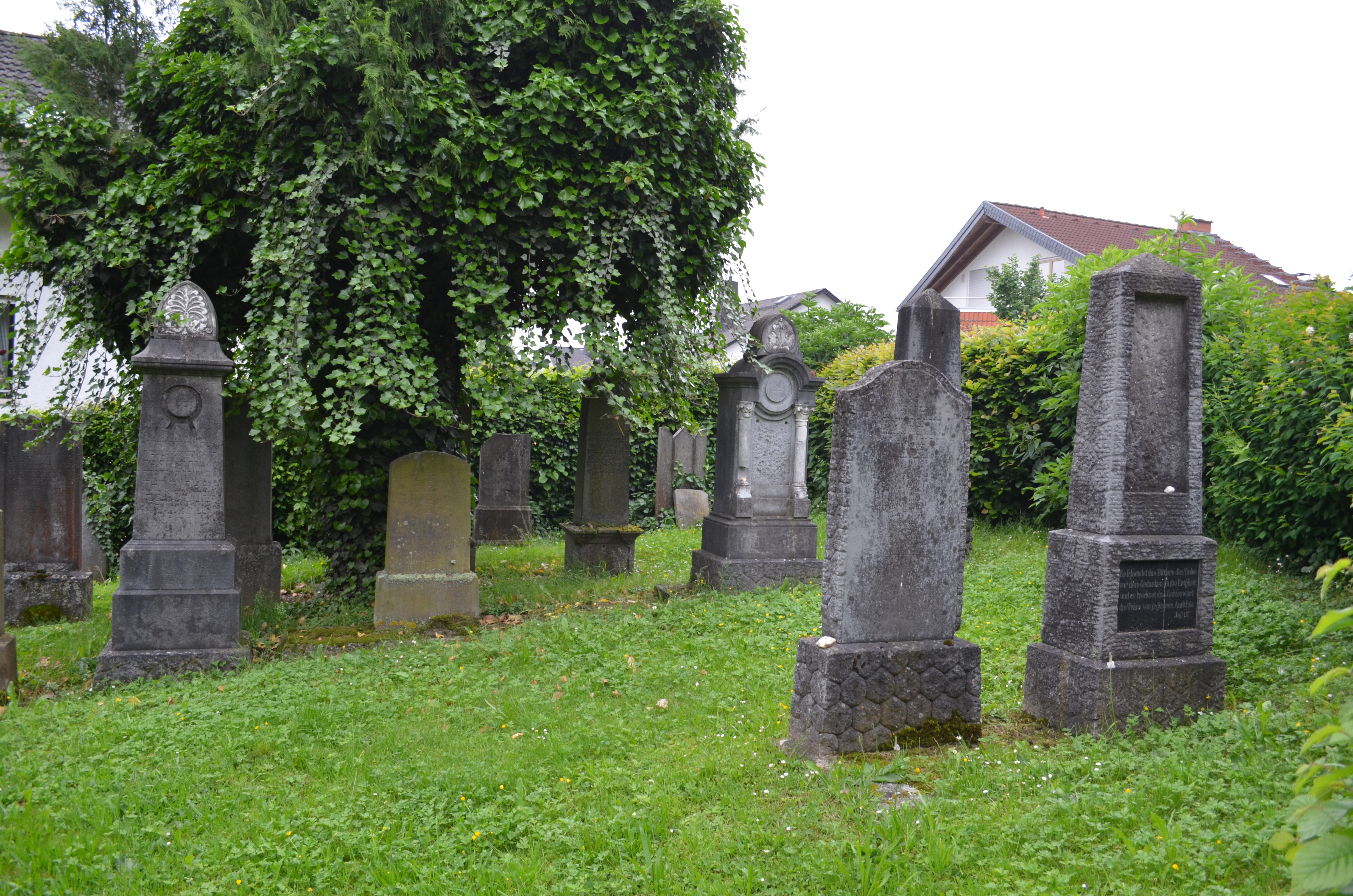 Bad Camberg, Alter jüdischer Friefhof